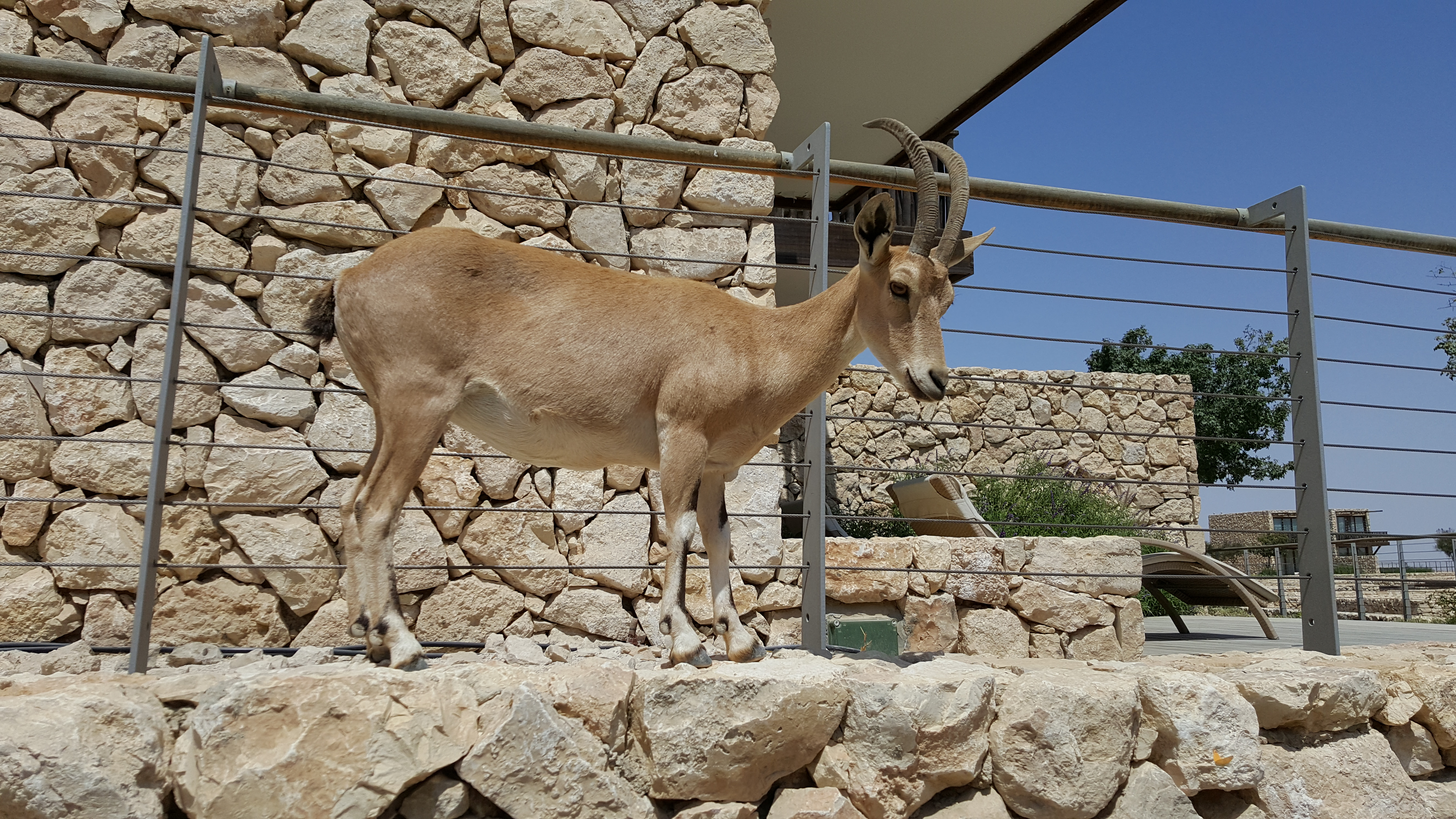 יעל במלון בראשית, מצפה רמון